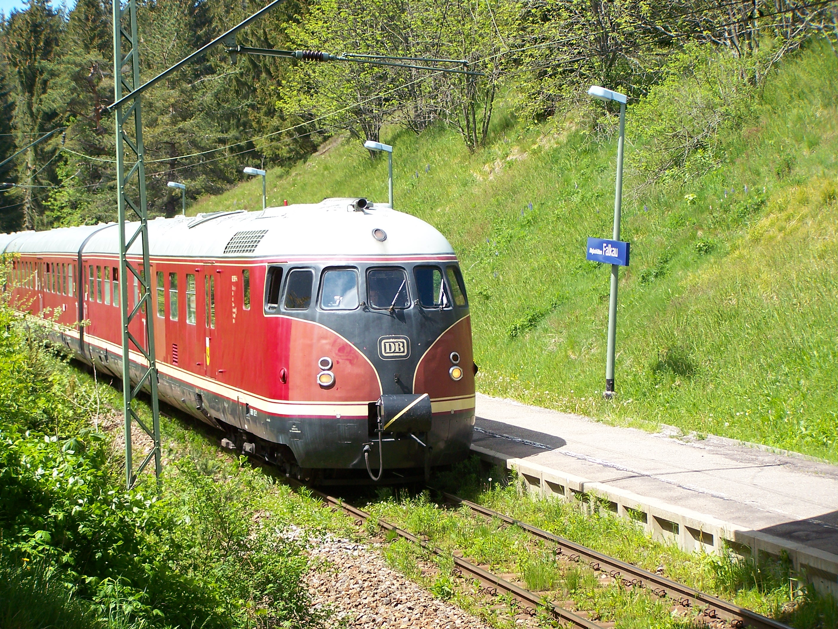 Stuttgarter Rössle als Sonderzug zum 80-jährigen Jubiläum der Dreiseenbahn